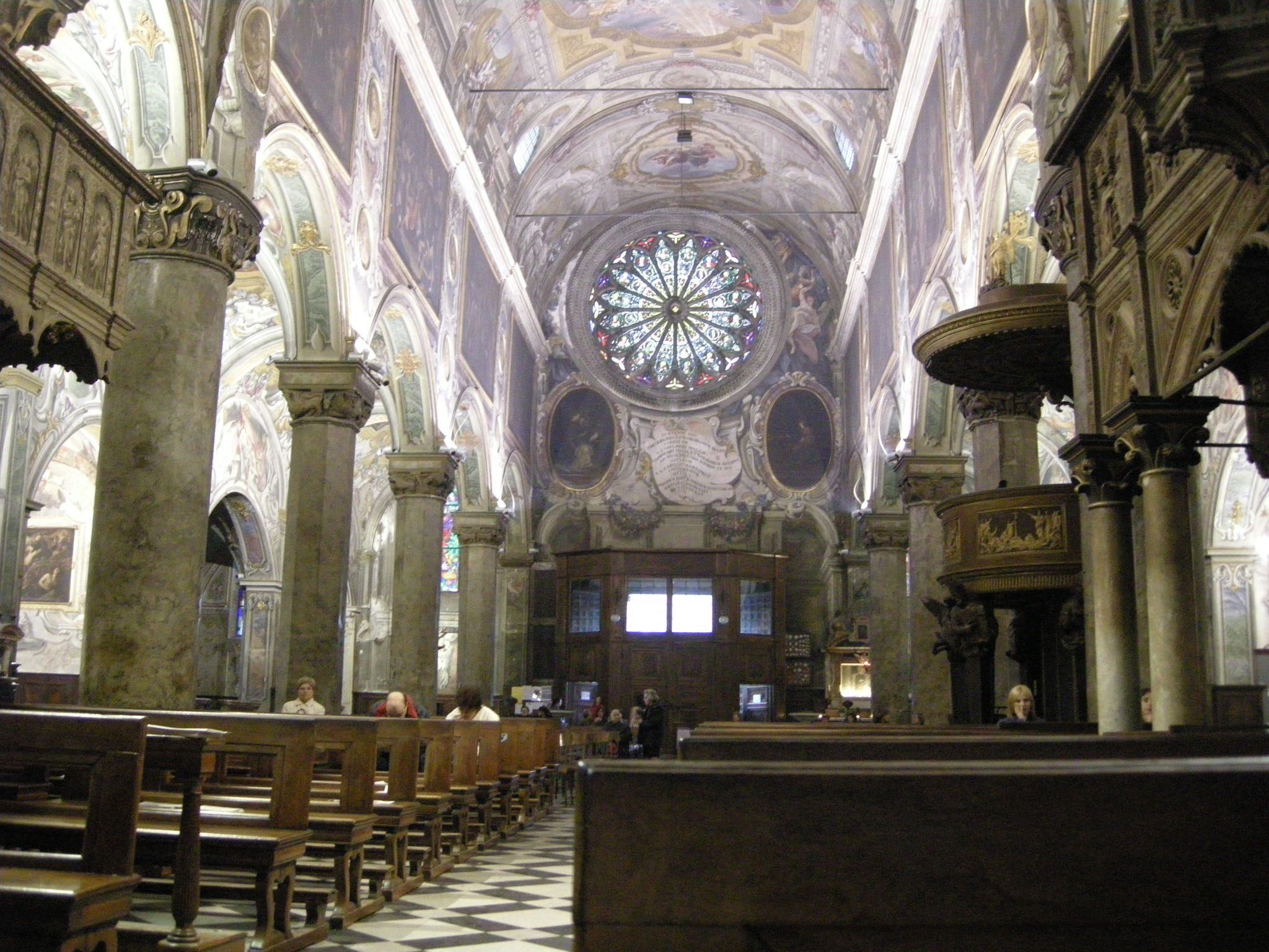 Duomo di monza, interno 03 controfacciata